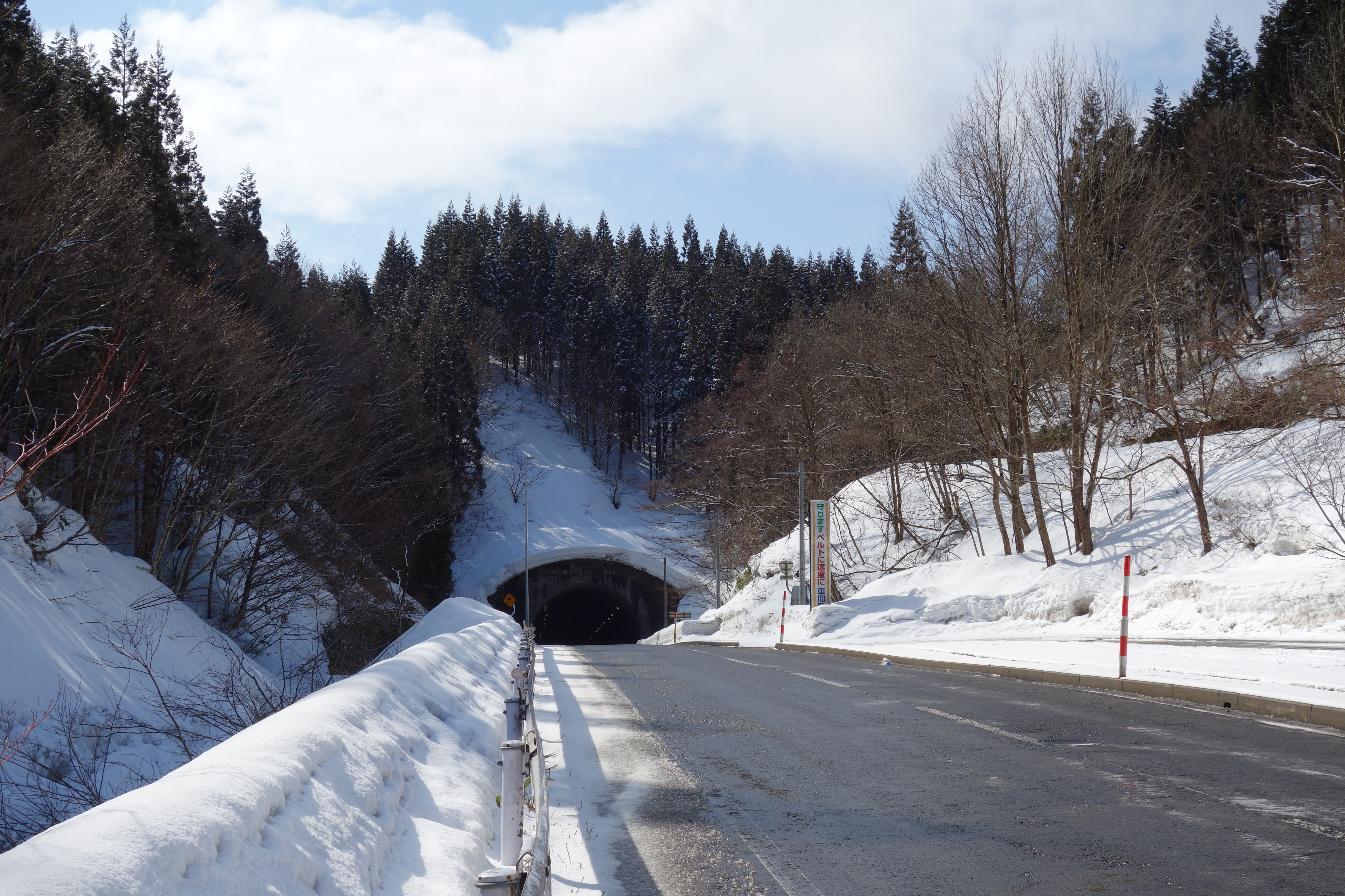 秋田県の上小阿仁村と五城目町の境にある秋田峠